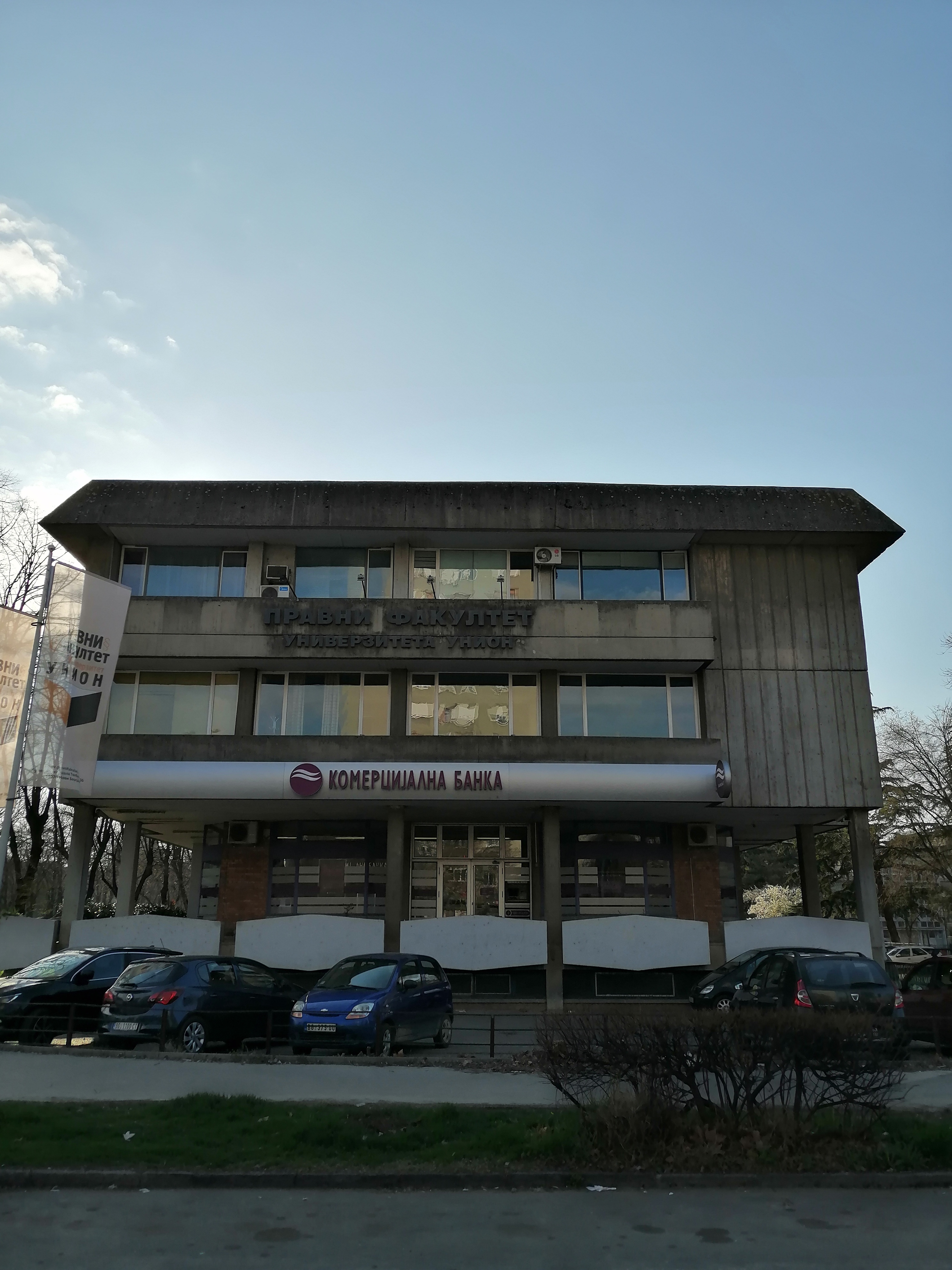 Srpski (latinica): Pravni fakultet Univerziteta Union